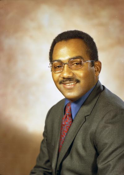 Senator George Fleming, 1971